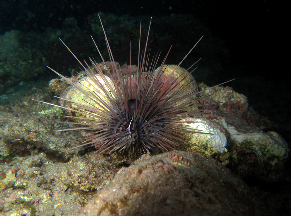 Jeune oursin Diadema savignyi, avec son ampoule anale bien visible (à la Réunion).